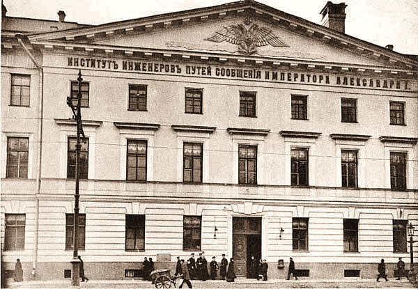 Istituto d'Ingegneria ferroviaria in San Pietroburgo. L'edificio principale